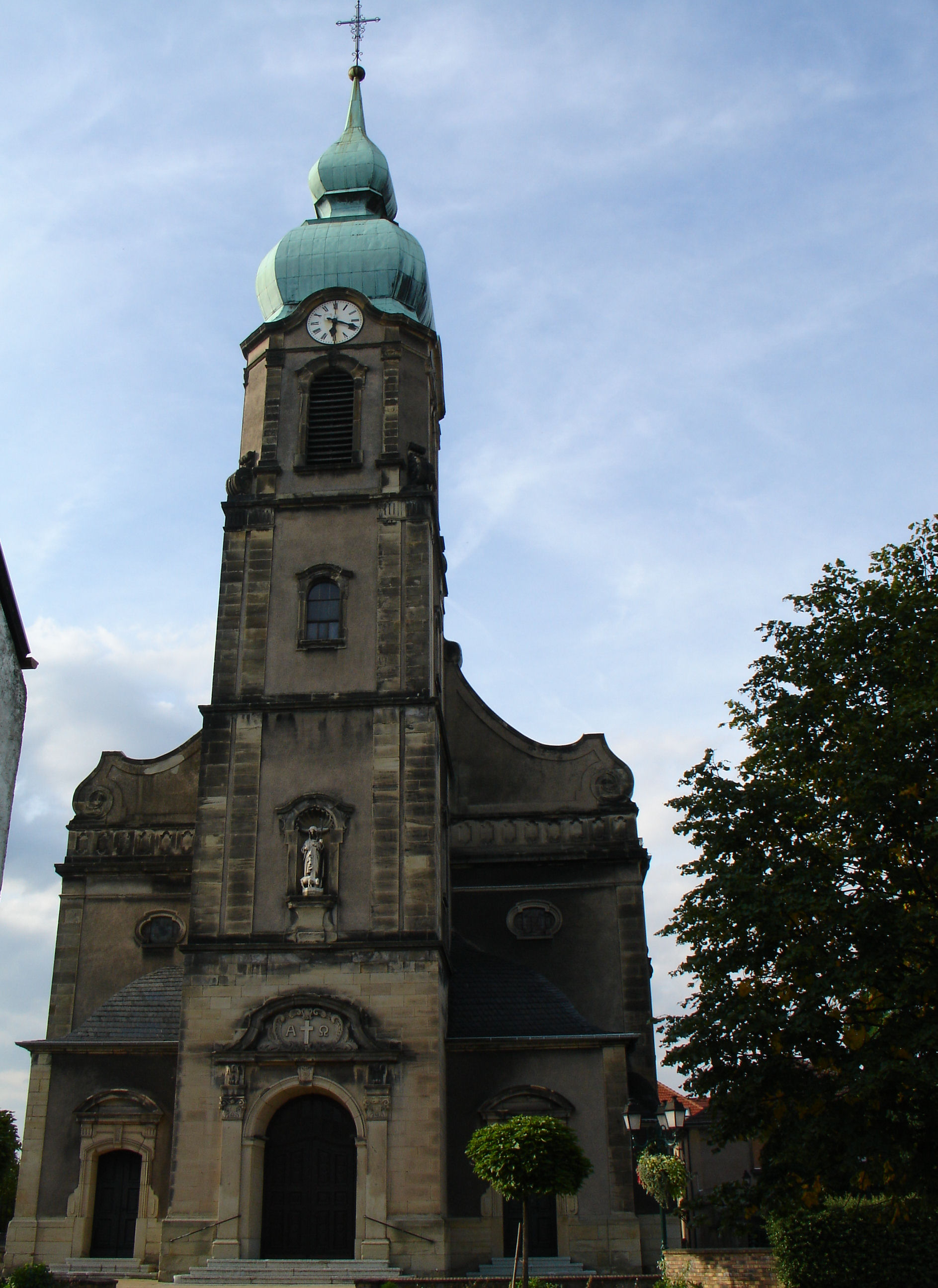 L'Église Saint-Maurice de Freyming-Merlebach (située dans le quartier de Freyming).